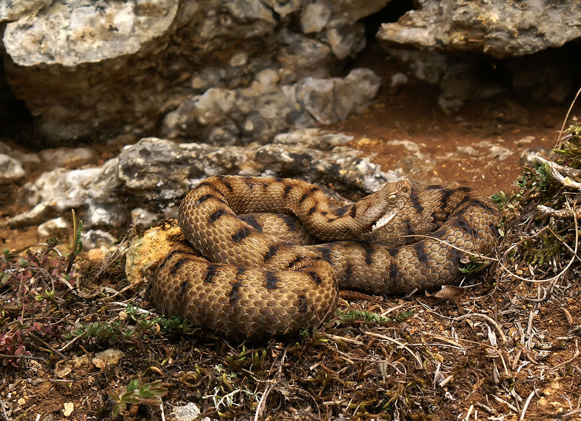 Vipera aspis female - adult